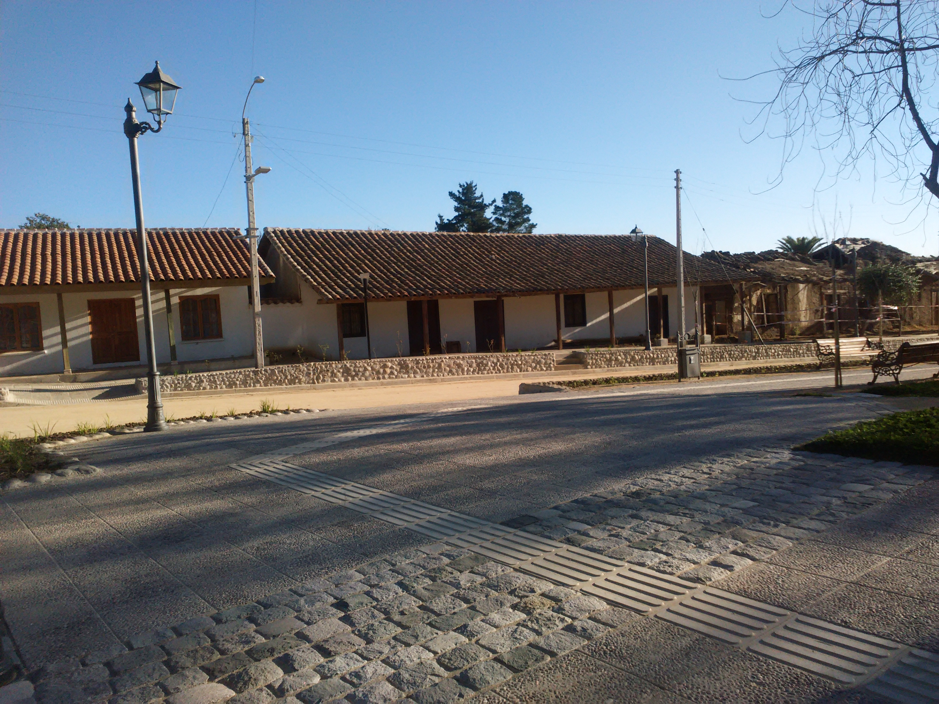 Imagen de la plaza de armas del pueblo de Huerta del Maule, VII regiòn, Chile.